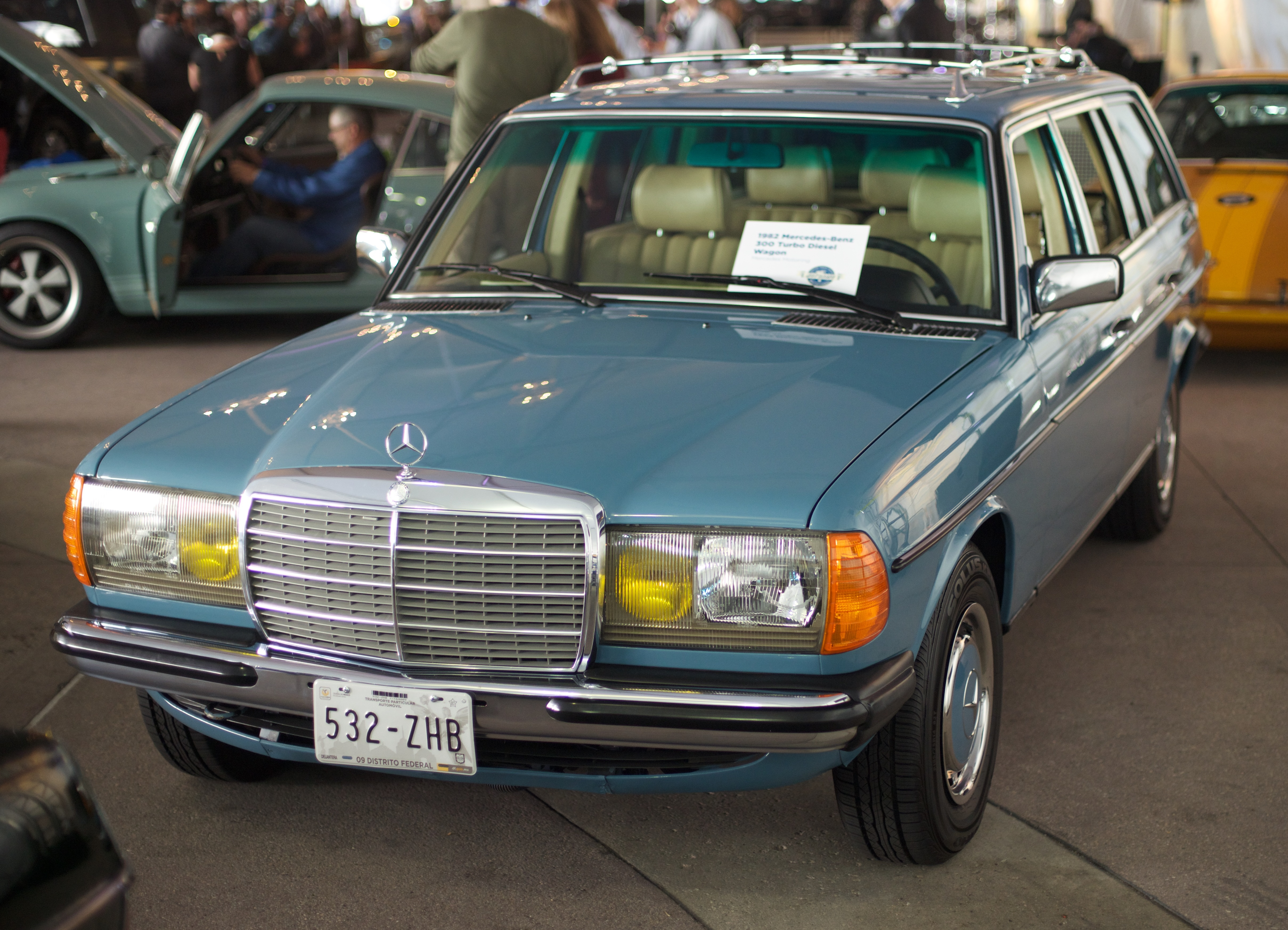 SLY_5607